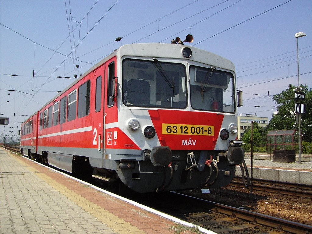 Dvouvozová souprava Bzmot na nějakém nejmenovaném nádraží v Maďarsku (Szolnok? Komárom?)